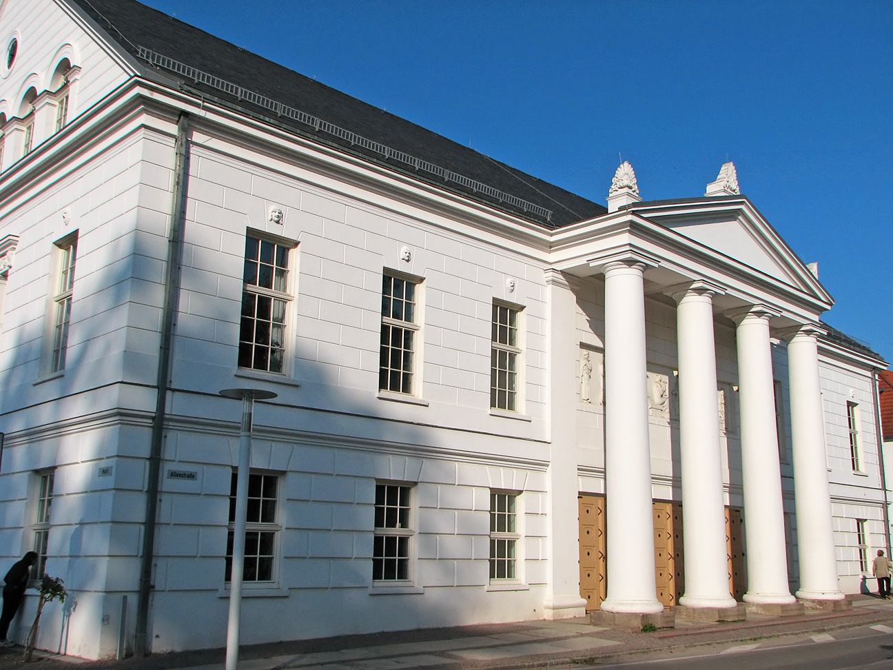 Beschreibung: Das Theater von Putbus. Fotograf: Darkone, 12. Oktober 2005